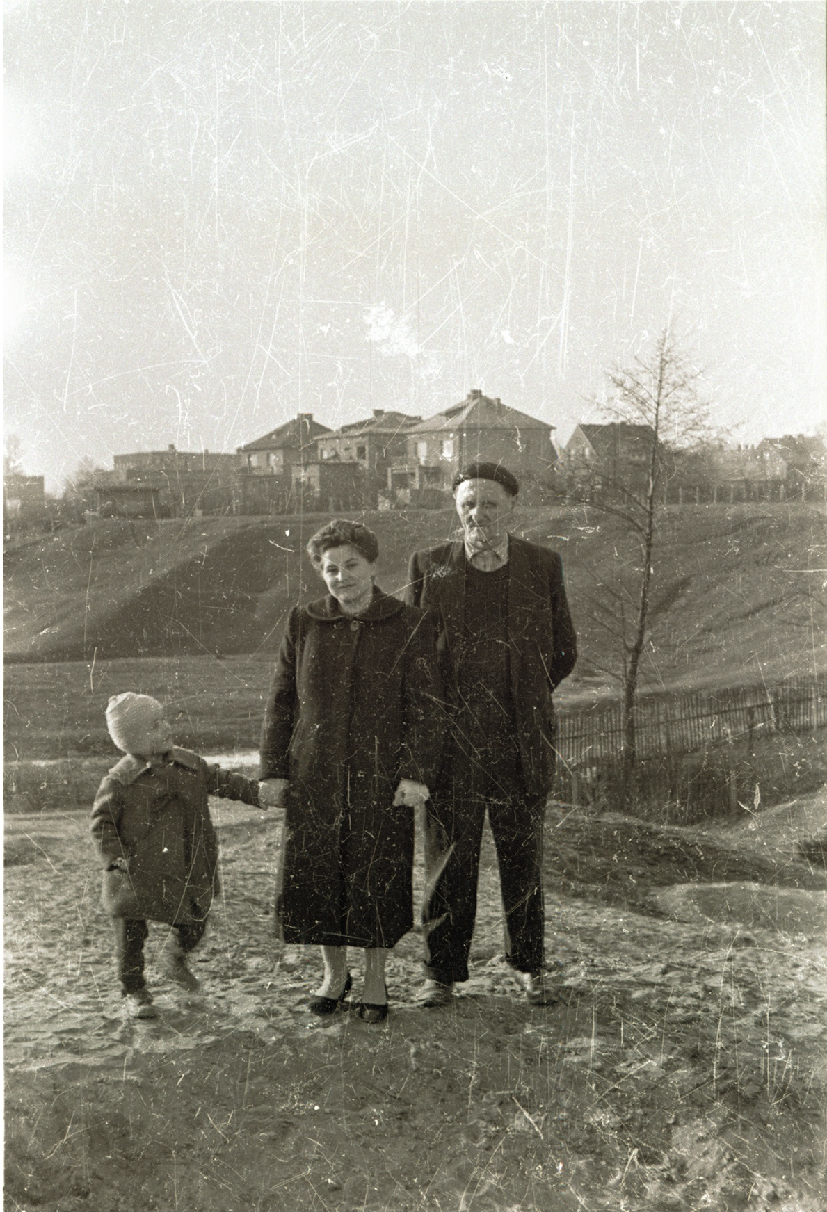 Katowice-Ochojec, widok na doline Slepiotki, wczesne lata 60 XXw. Slepiotka Valley in Katowice, early 60s.